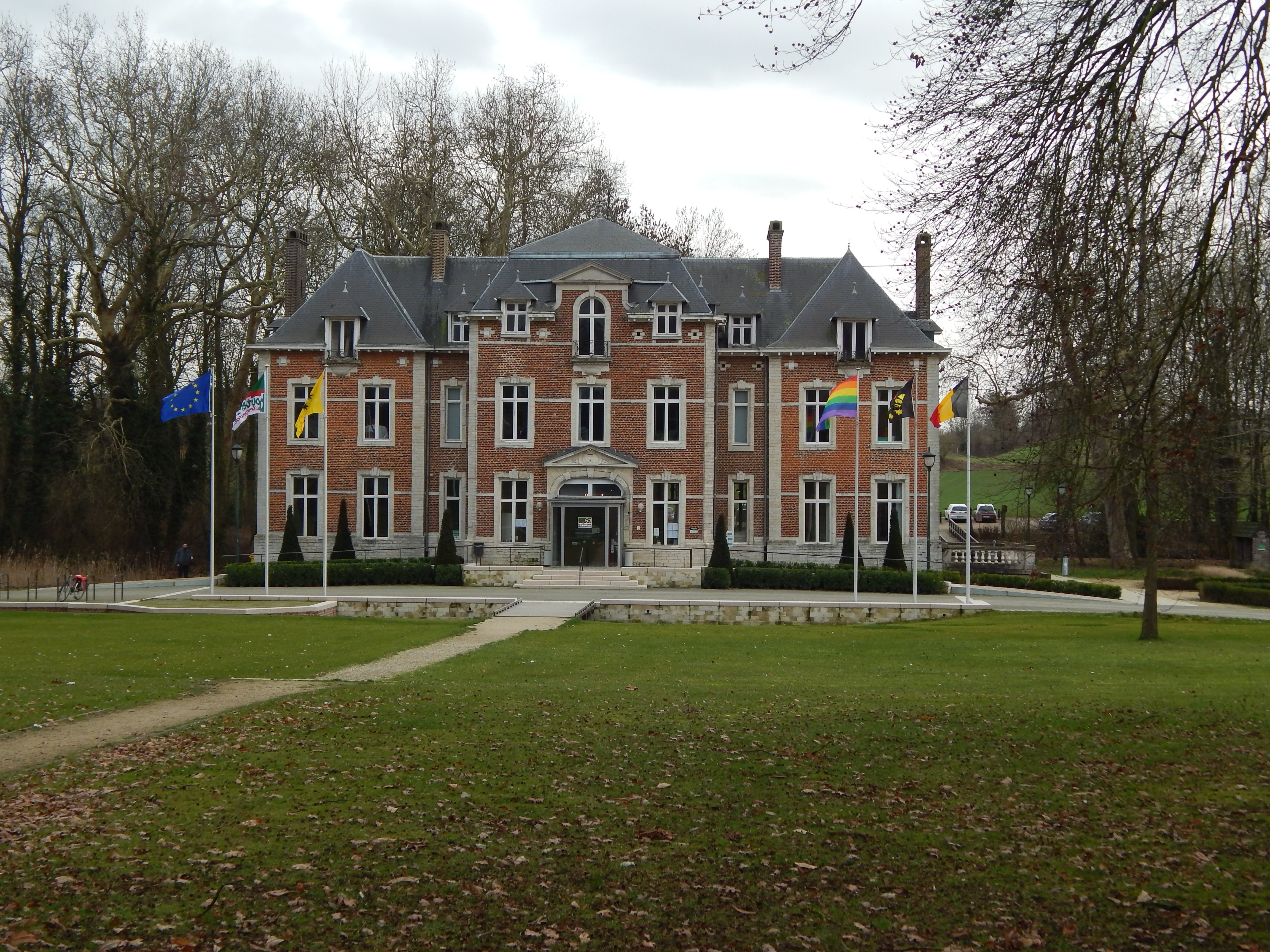 Vooraanzicht kasteel van Kwabeek